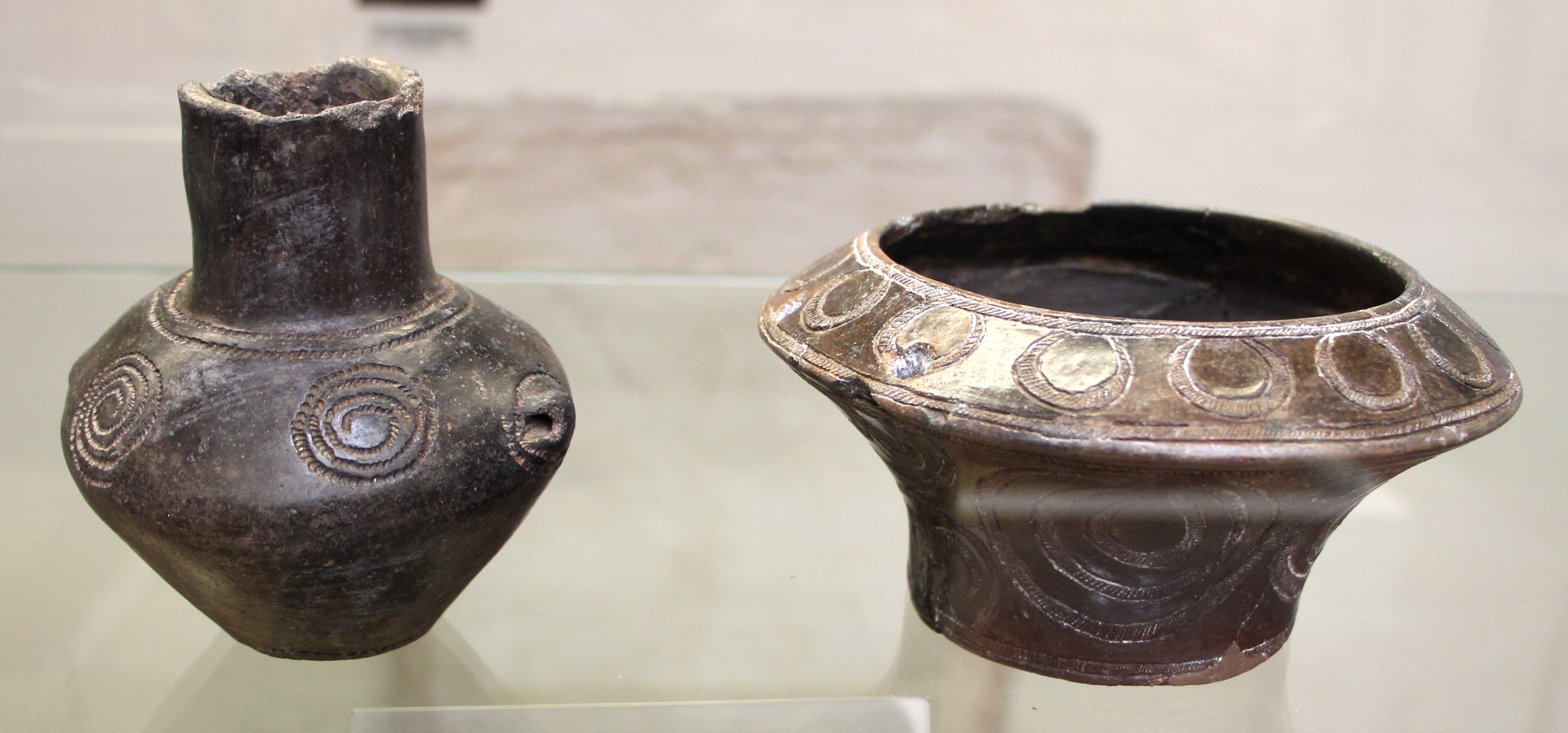 Museo archeologico nazionale G.A. Sanna - MIBAC The making of this document was supported by Wikimedia CH. (Submit your project!) For all the files concerned, please see the category Supported by Wikimedia CH. This is a photo of a monument which is part of cultural heritage of Italy.